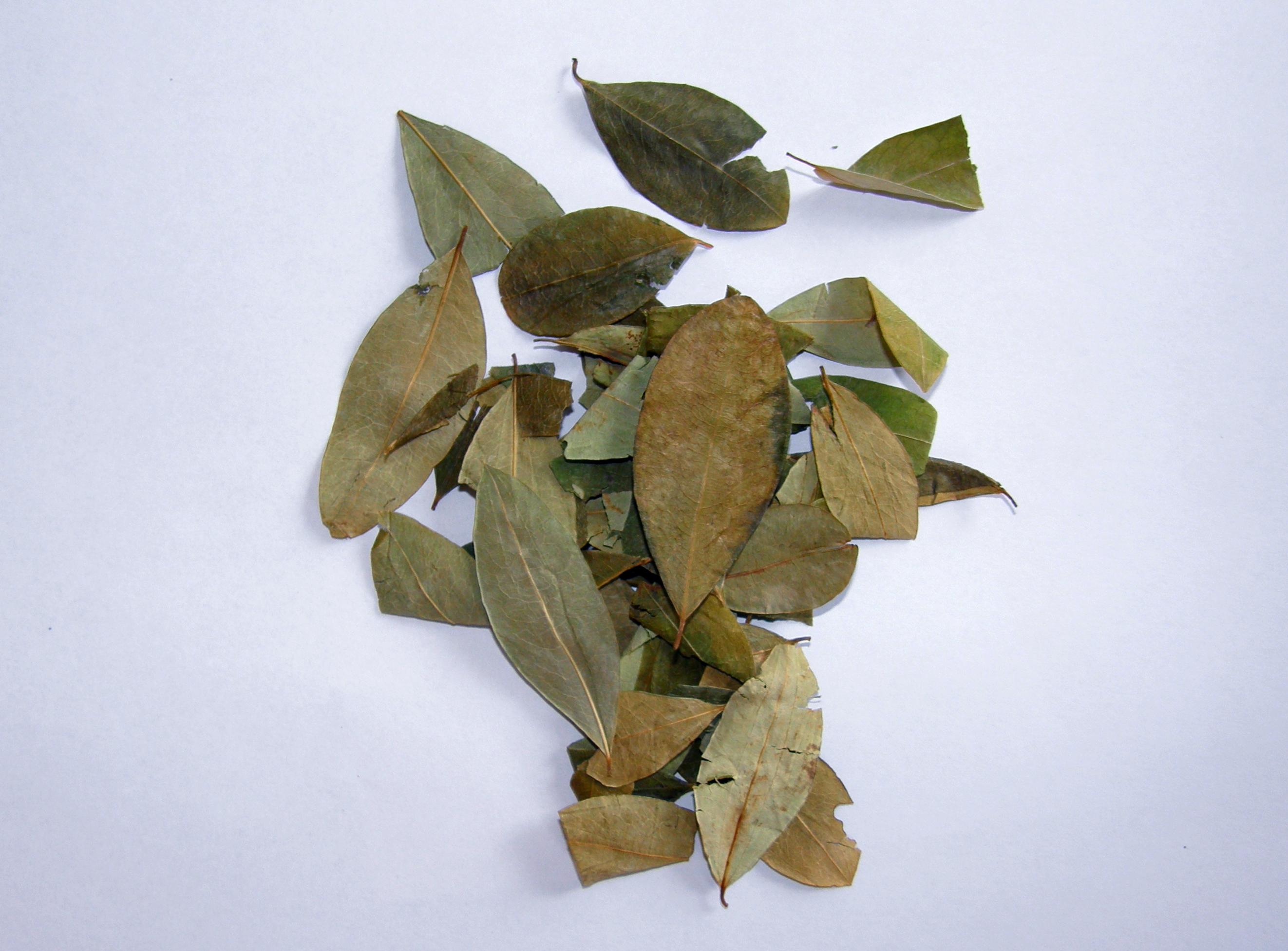 Feuilles de coca (Erythroxylum coca) séchées, prêtes à être consommées.